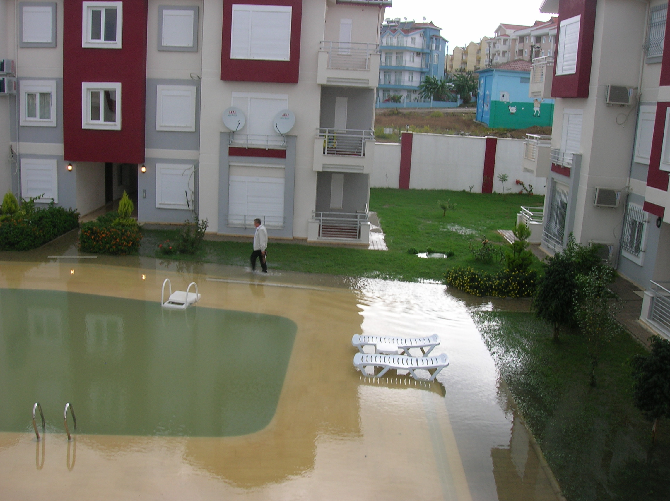 Zelfgemaakte foto, november 2006, (c) Erik1980: Flinke wateroverlast na twee dagen onophoudelijke regenval in Side, Turkije.